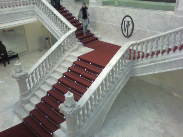 Escalinata de la entrada del Teatro Victoria Eugenia (San Sebastián, España)